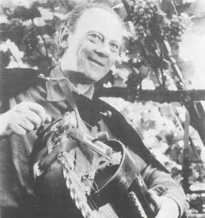 Foto van Rob van der Bas in Tomatuva